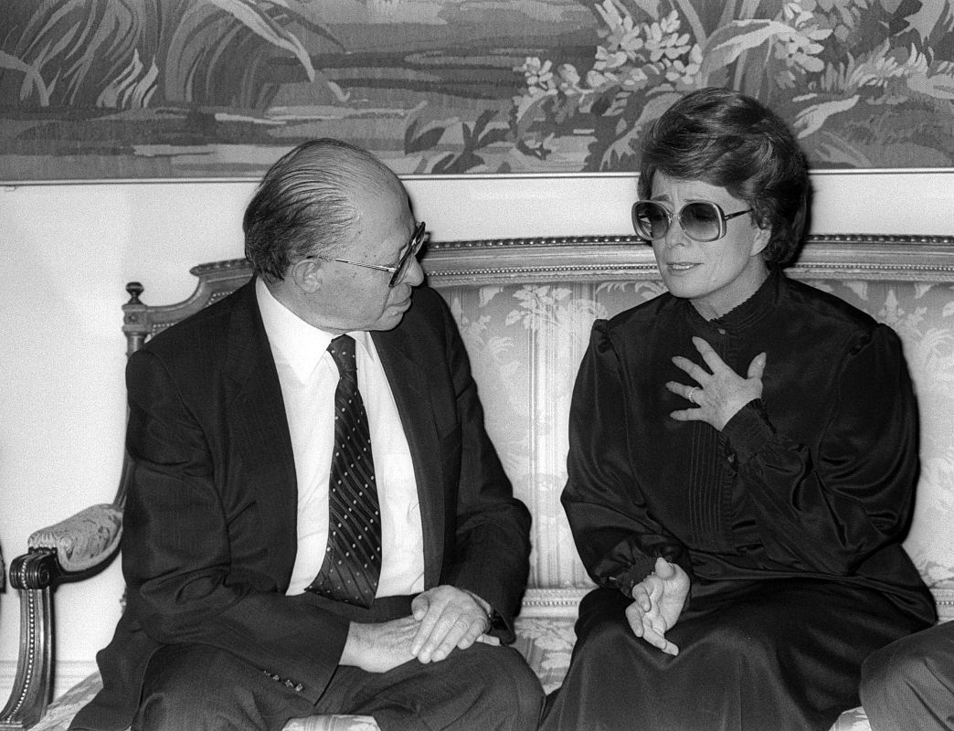 בגין בקהיר אחרי רצח סאדת עם האלמנה ג'יהן